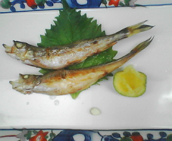 also at tsukiji UOTAKE